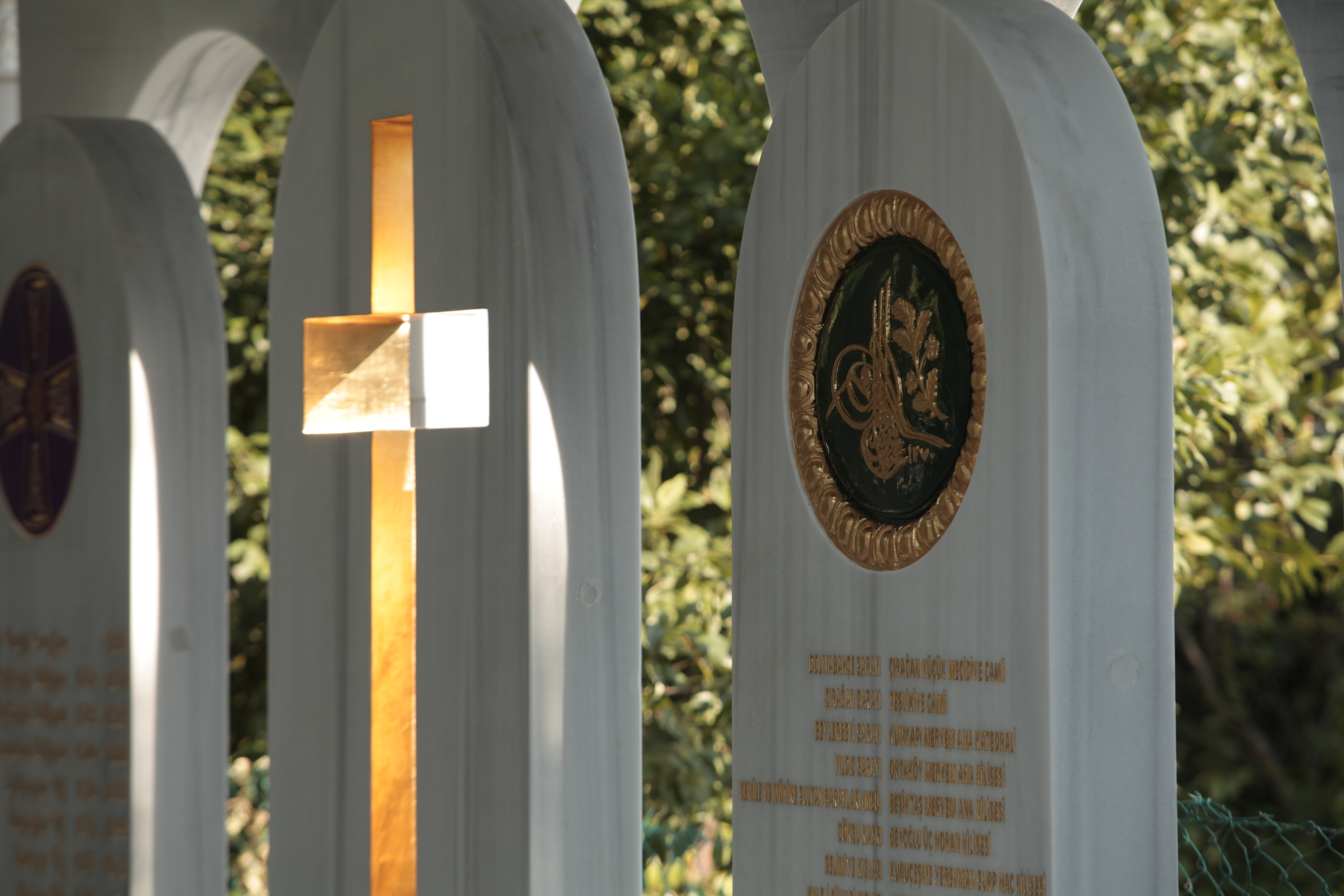 Üsküdar Bağlarbaşı'nda buluna Balyan Ailesi Anıt Mezarı